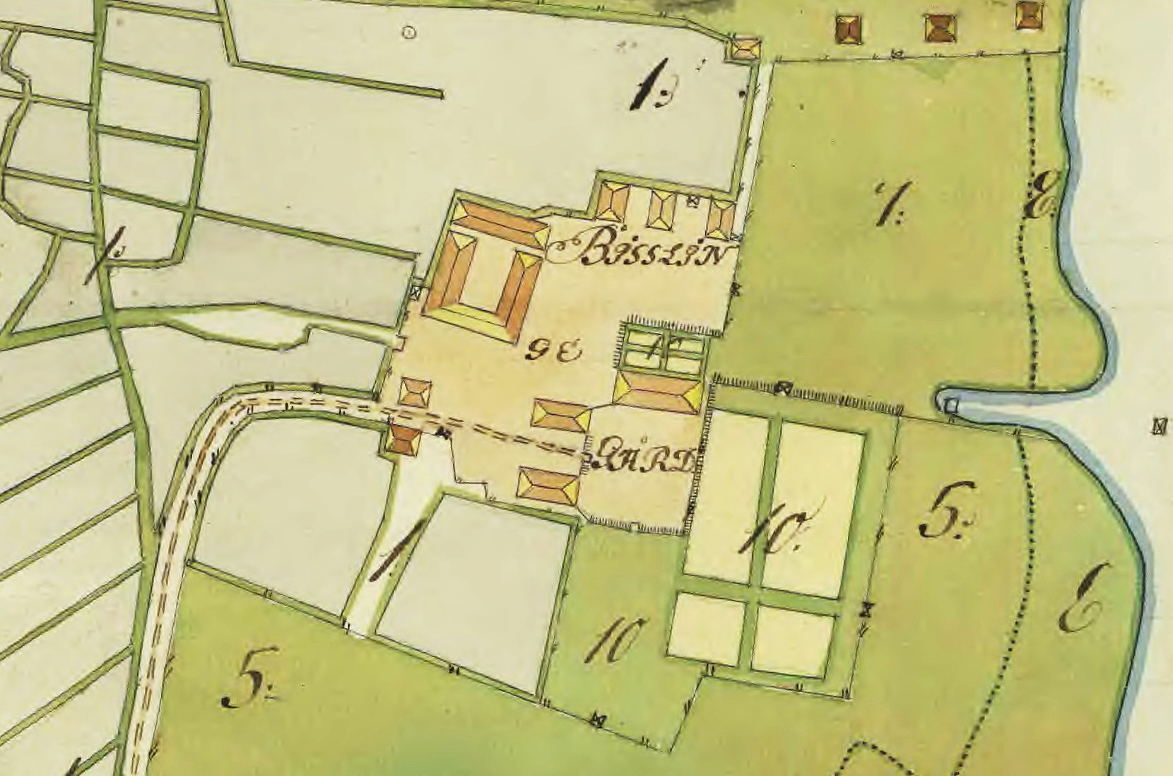 Bisslinge gårds byggnader